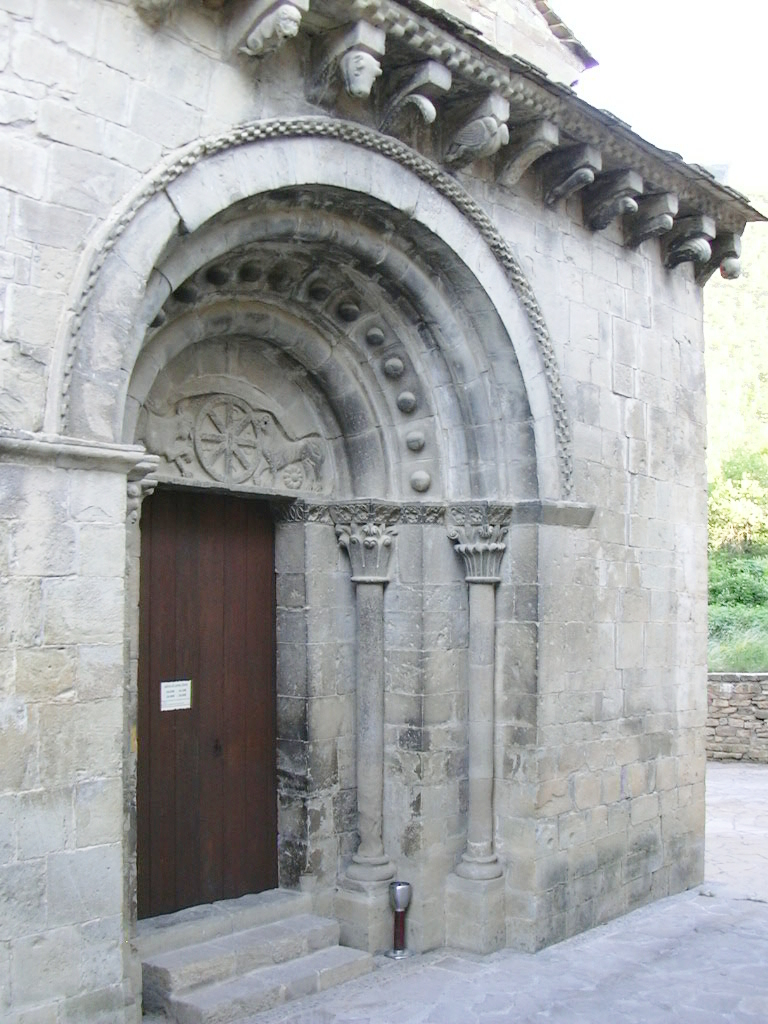 Iglesia de Santa María en Santa Cruz de la Serós- Portada - Siglos XI y XII